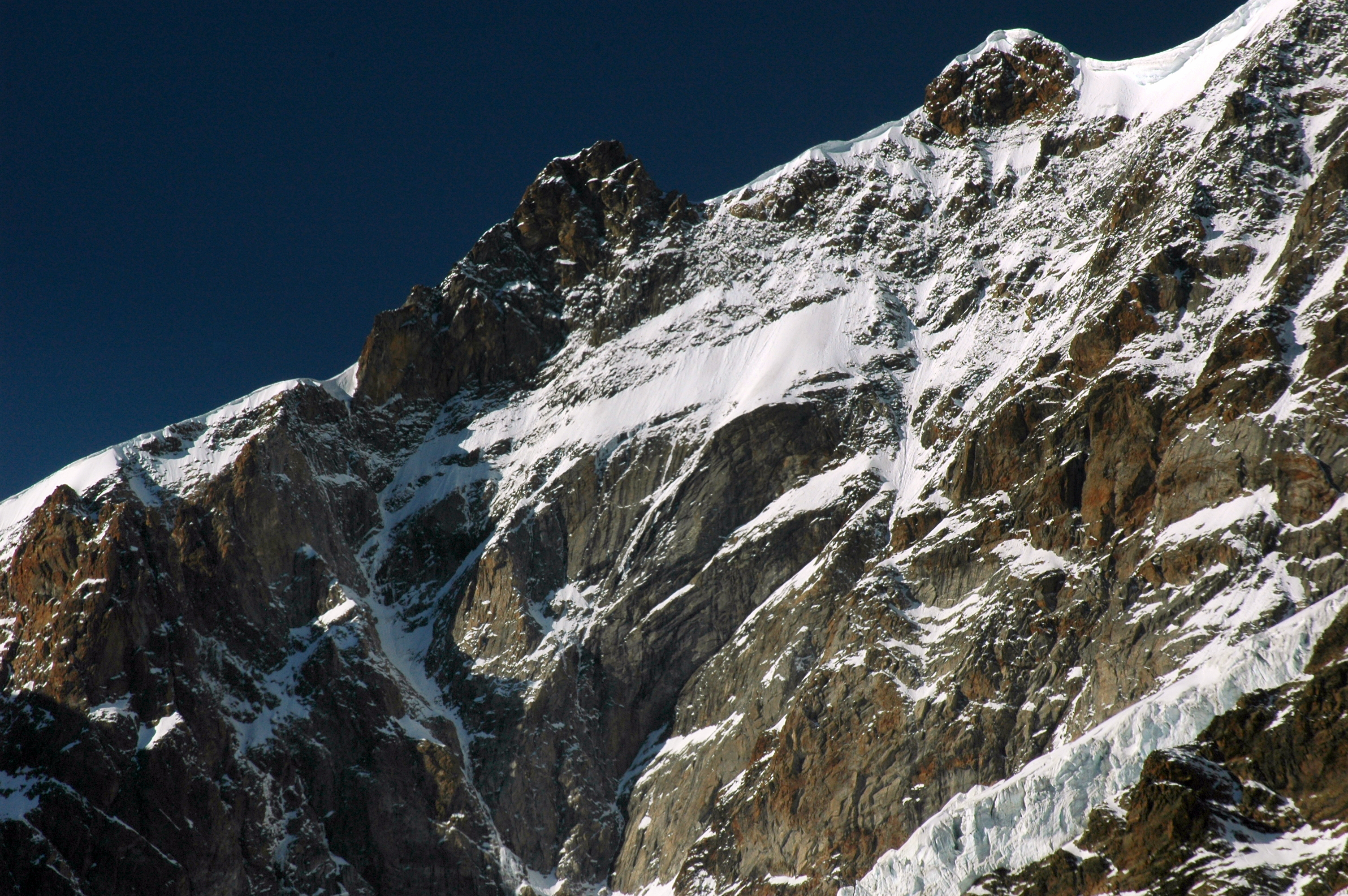 La sud-est del Corno Nero m.4322